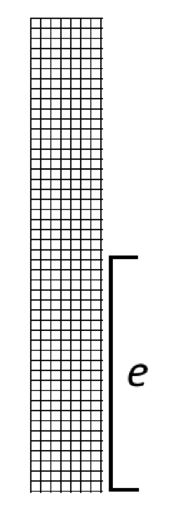 Afstanden e er fra et tværsnits tyngdepunkt ud til det yderste punkt på tværsnittet